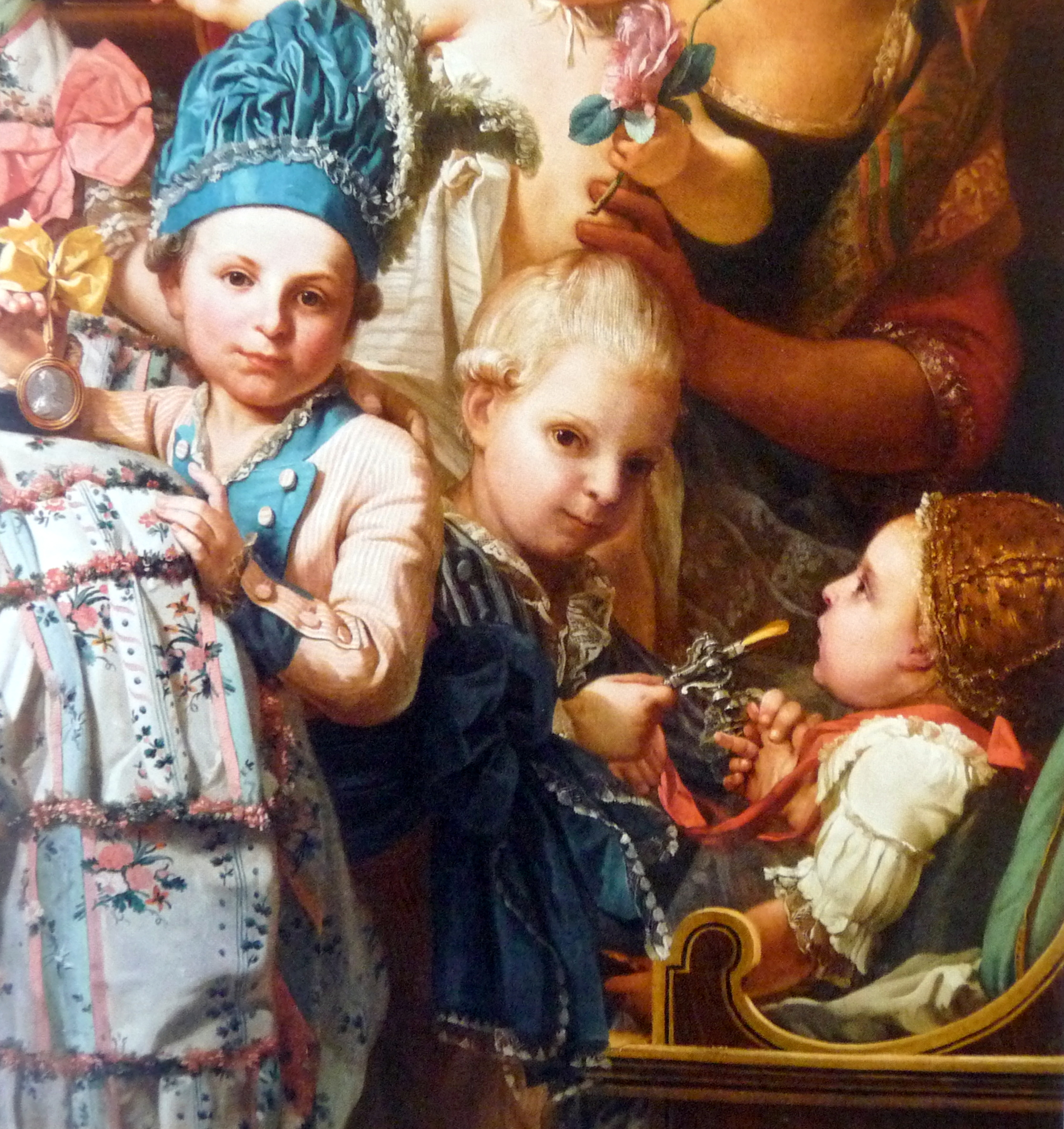 Kunstvoll gestaltete Hauben runden hier die modische Erscheinung einer ganzen Kinderschar ab. Das Kleinkind rechts im Vordergrund trägt eine Sturzhaube.